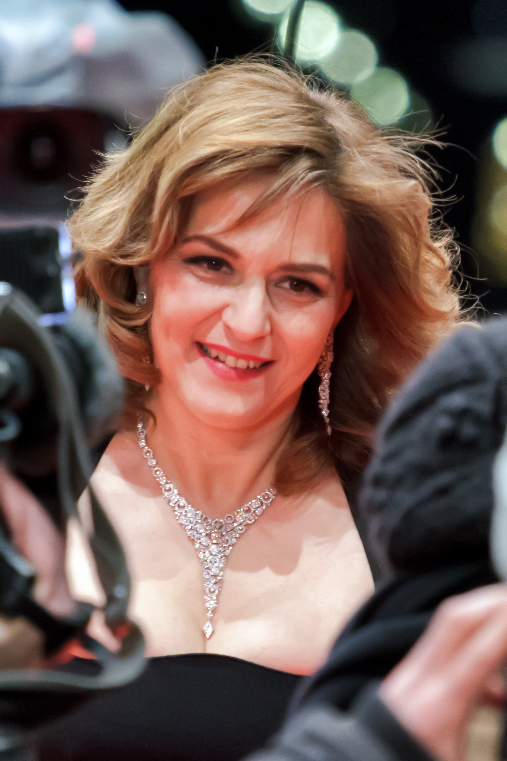 Martina Gedeck - Berlinale - 2013